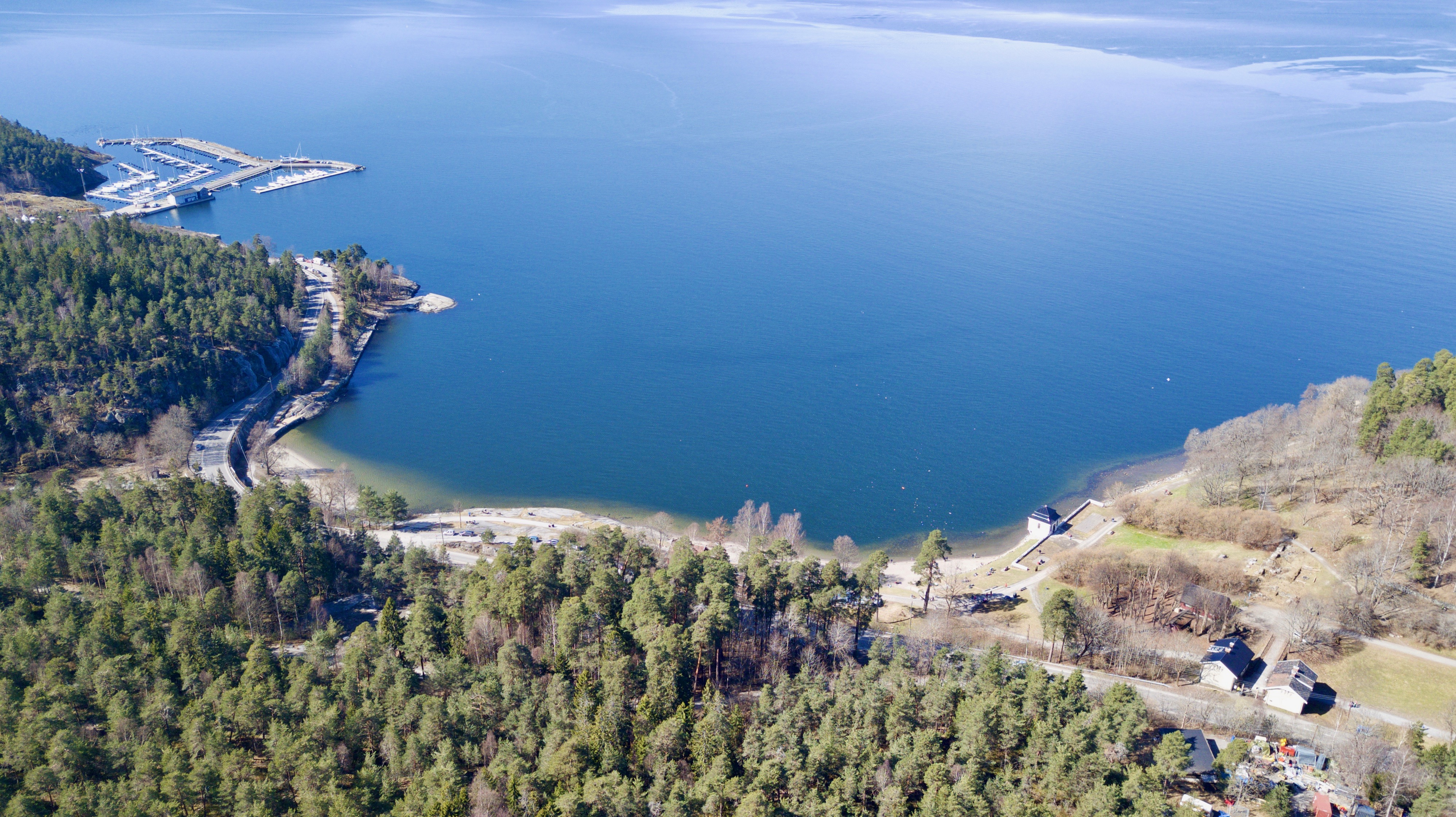 Hvervenbukta i Oslo.